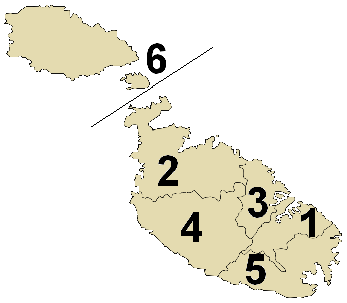 Distritos Malteses enumerados.